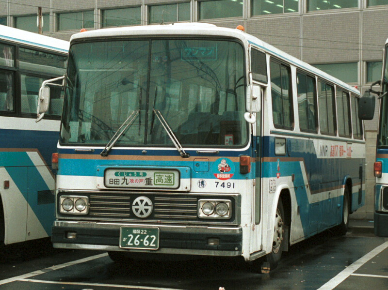 かなり過去の車両